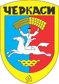 Герб Черкасc (1985)